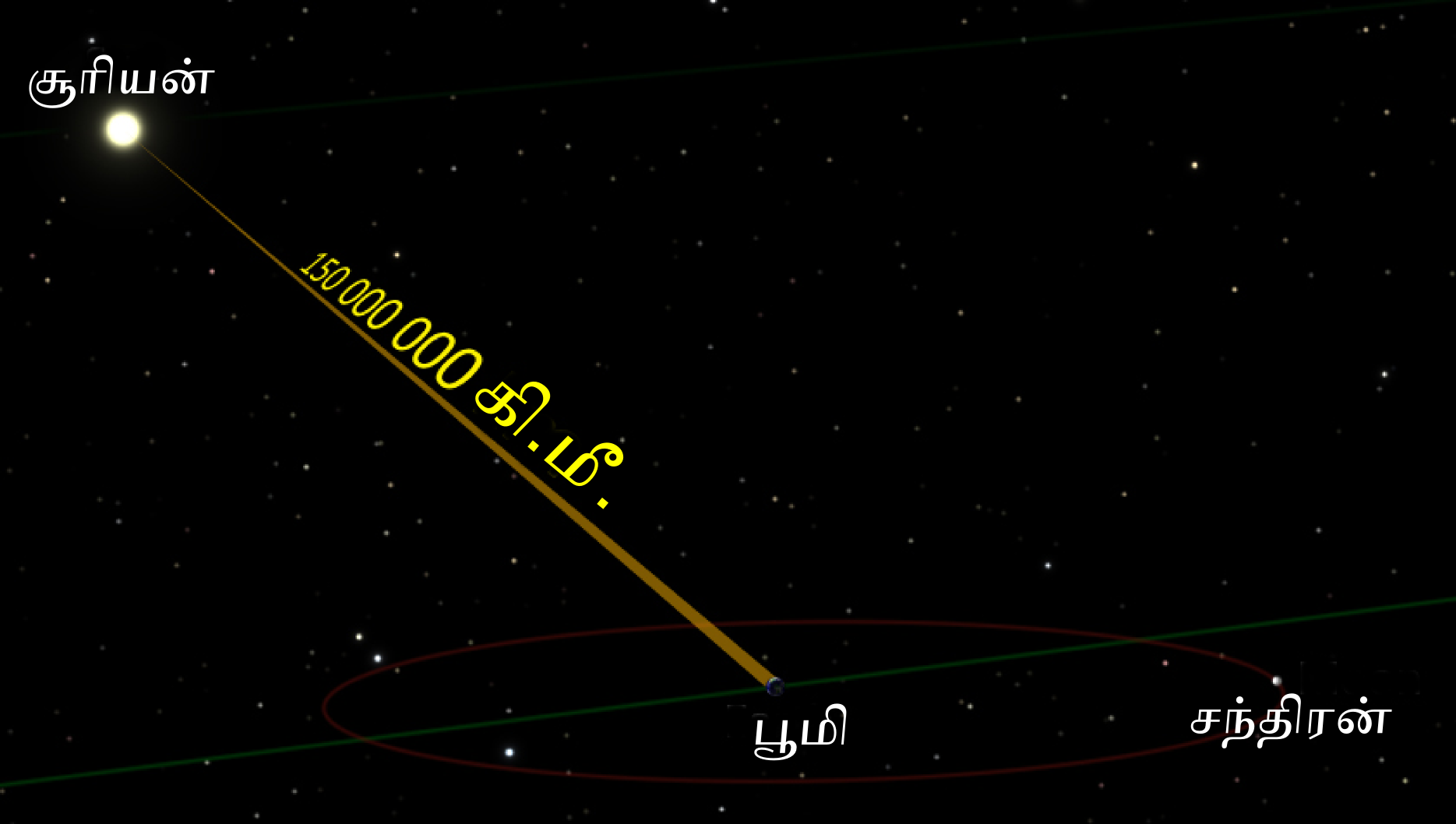 சூரியன் முதல் பூமி வரை உள்ள தொலைவு